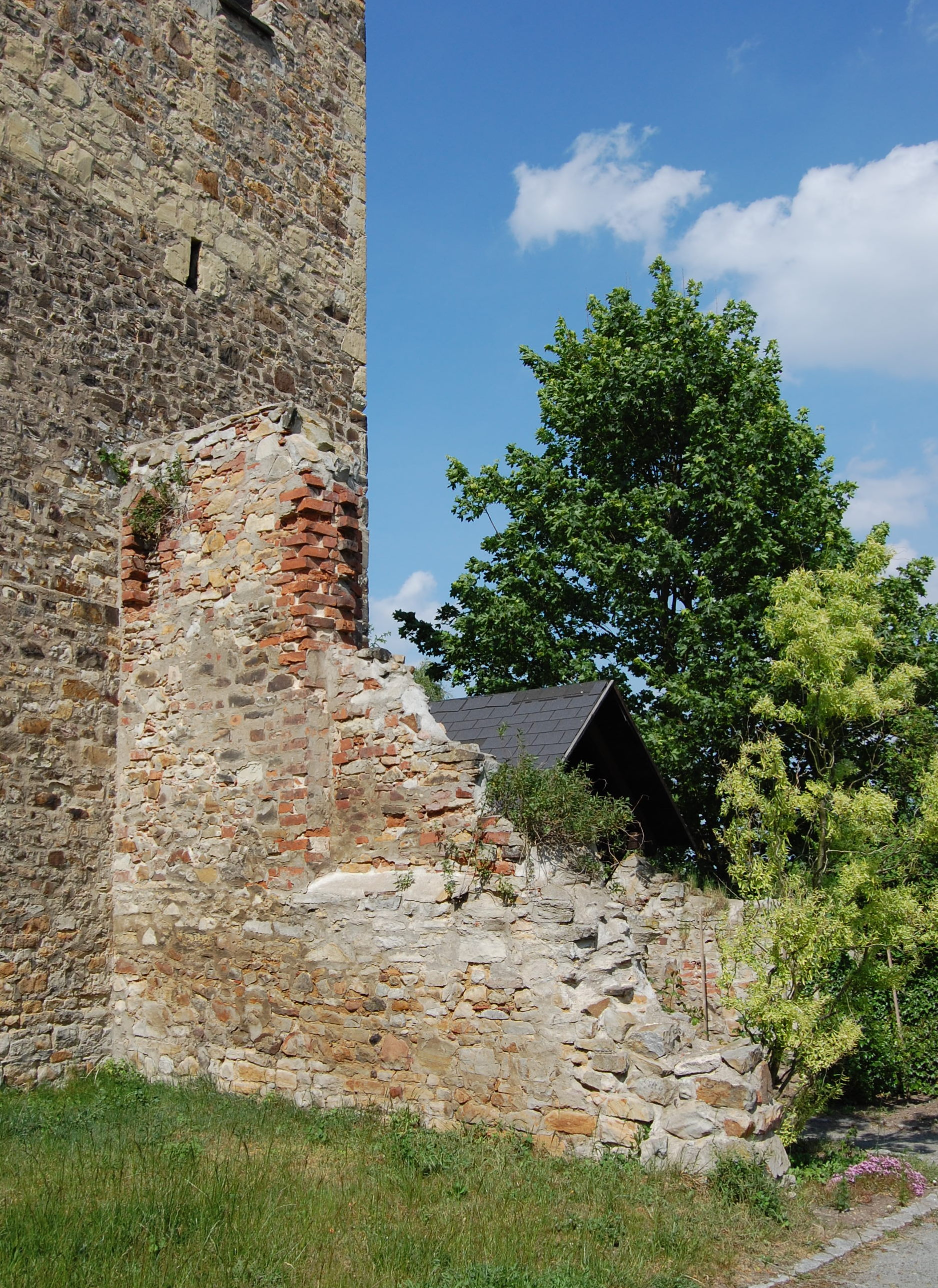 westliche Mauer der ehemaligen Vorhalle der Sankt-Stephanus-Kirche Magdeburg-Westerhüsen